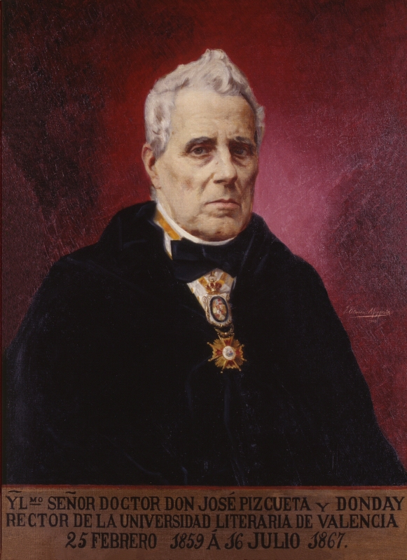 Retrato del médico, botánico y catedrático español José Pizcueta y Donday (1792-1870), que fue rector de la Universidad de Valencia.